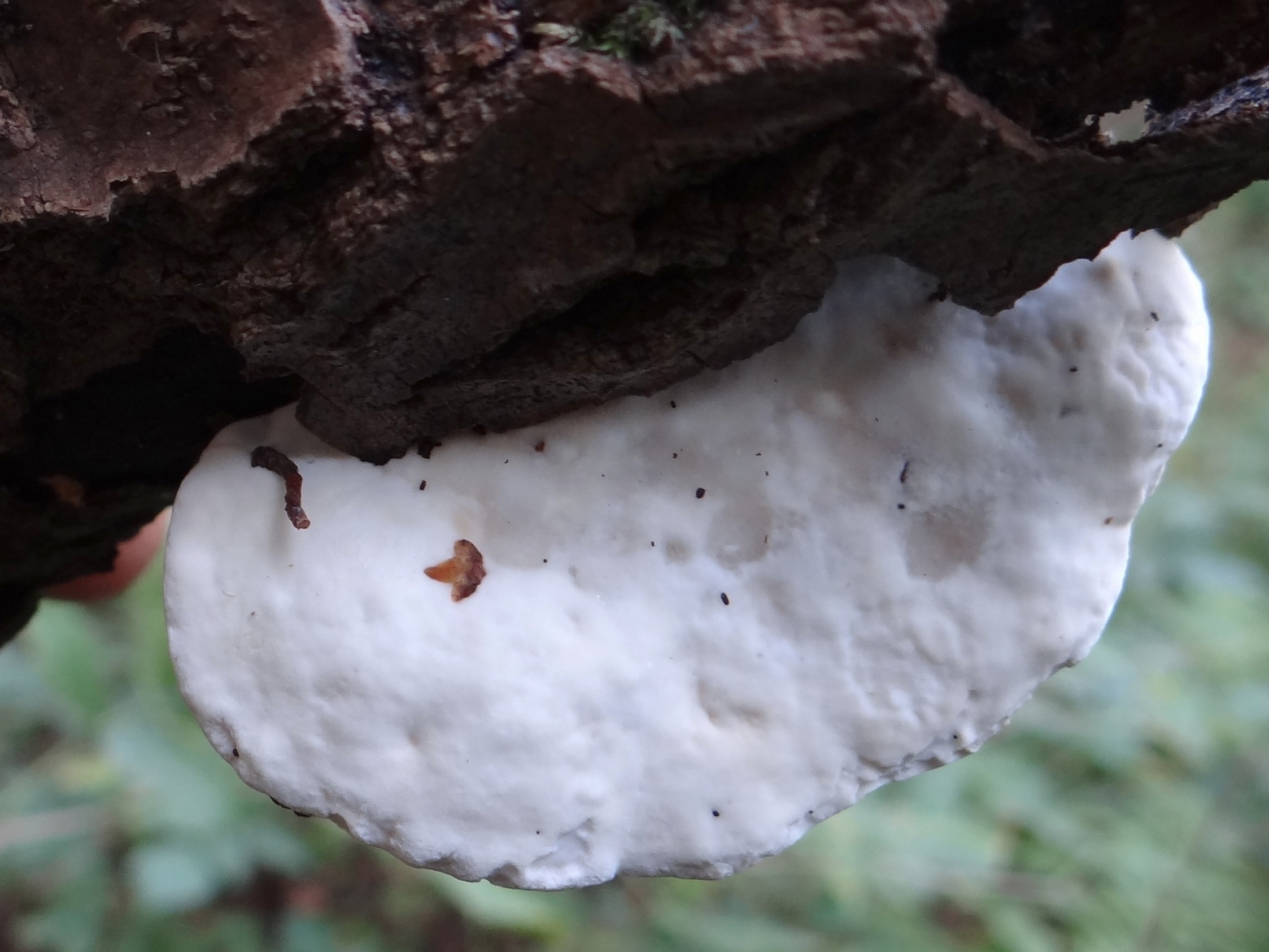 Postia stiptica